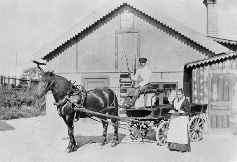 Lägenheten Skansberg öster om Skanstullsbron. "Johanneshov. Höjden å skansberg. Ägare slaktarmästare Erik Jansson. På bilden kusken Gustaf och trotjänarinnan Lotta Karlsson."